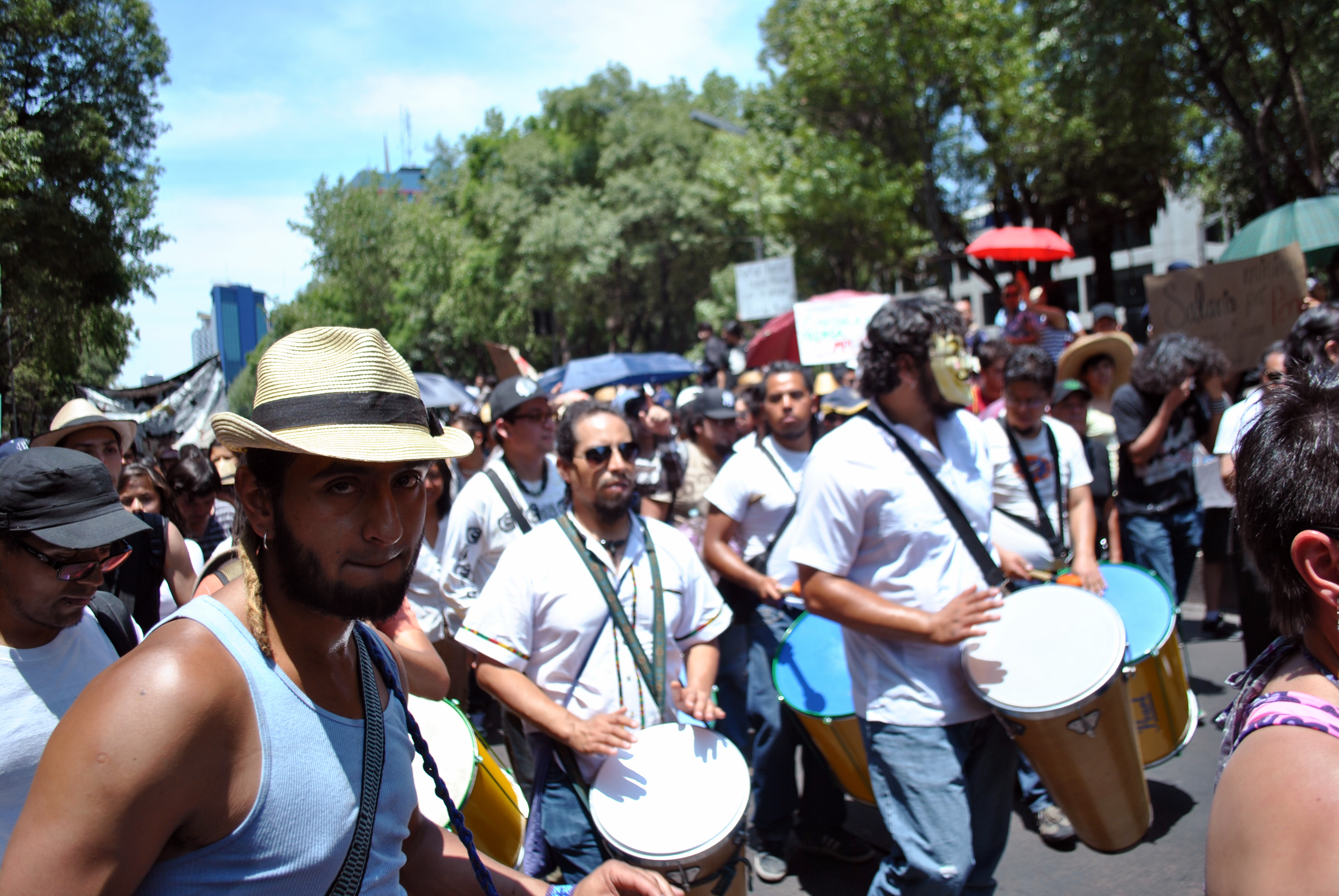 Manifestantes en la marcha #YoSoy132, Ciudad de México.